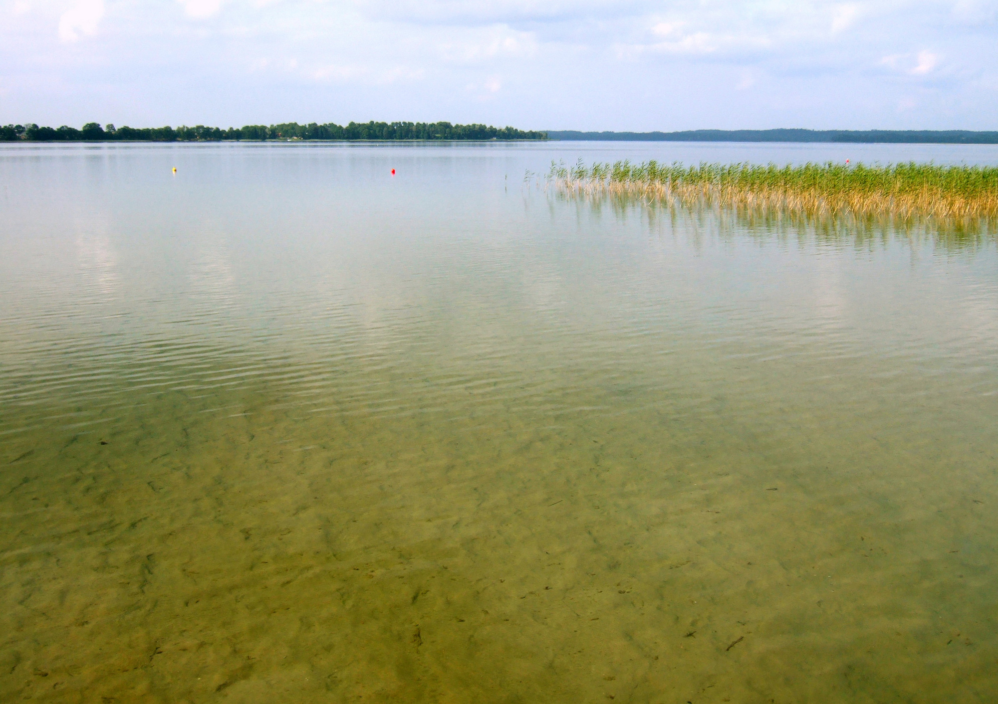 Ežero atabradas